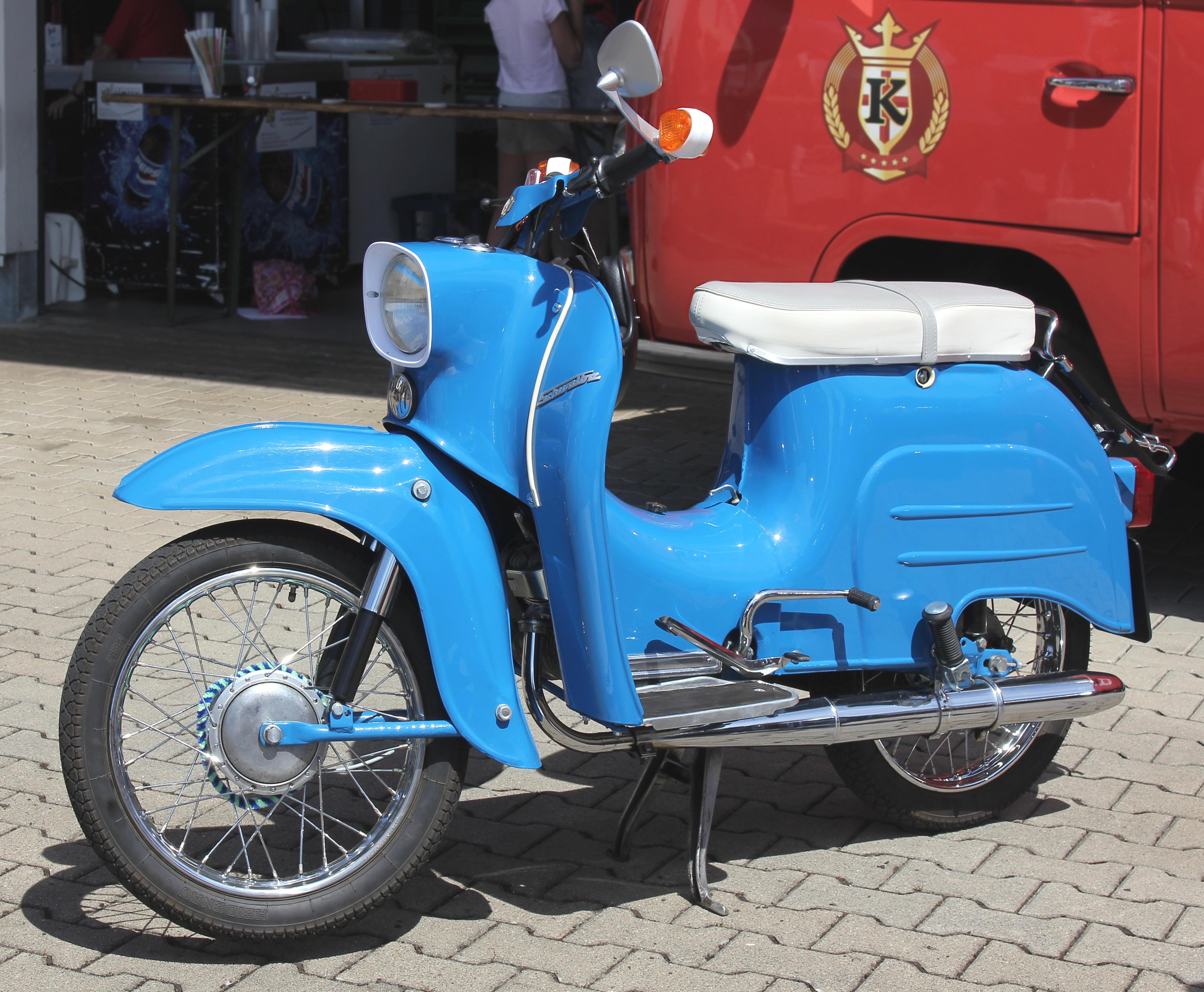 Simson Schwalbe KR 51/1 F